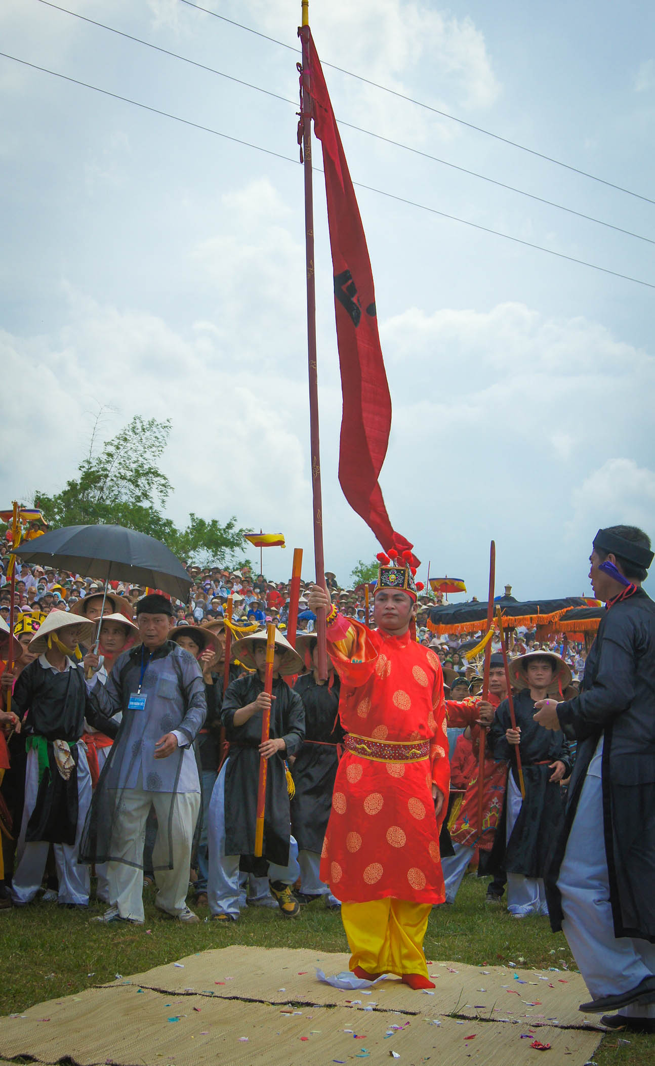 Màn múa cờ ở Hội Gióng làng Phù Đổng (Gia Lâm) năm 2011